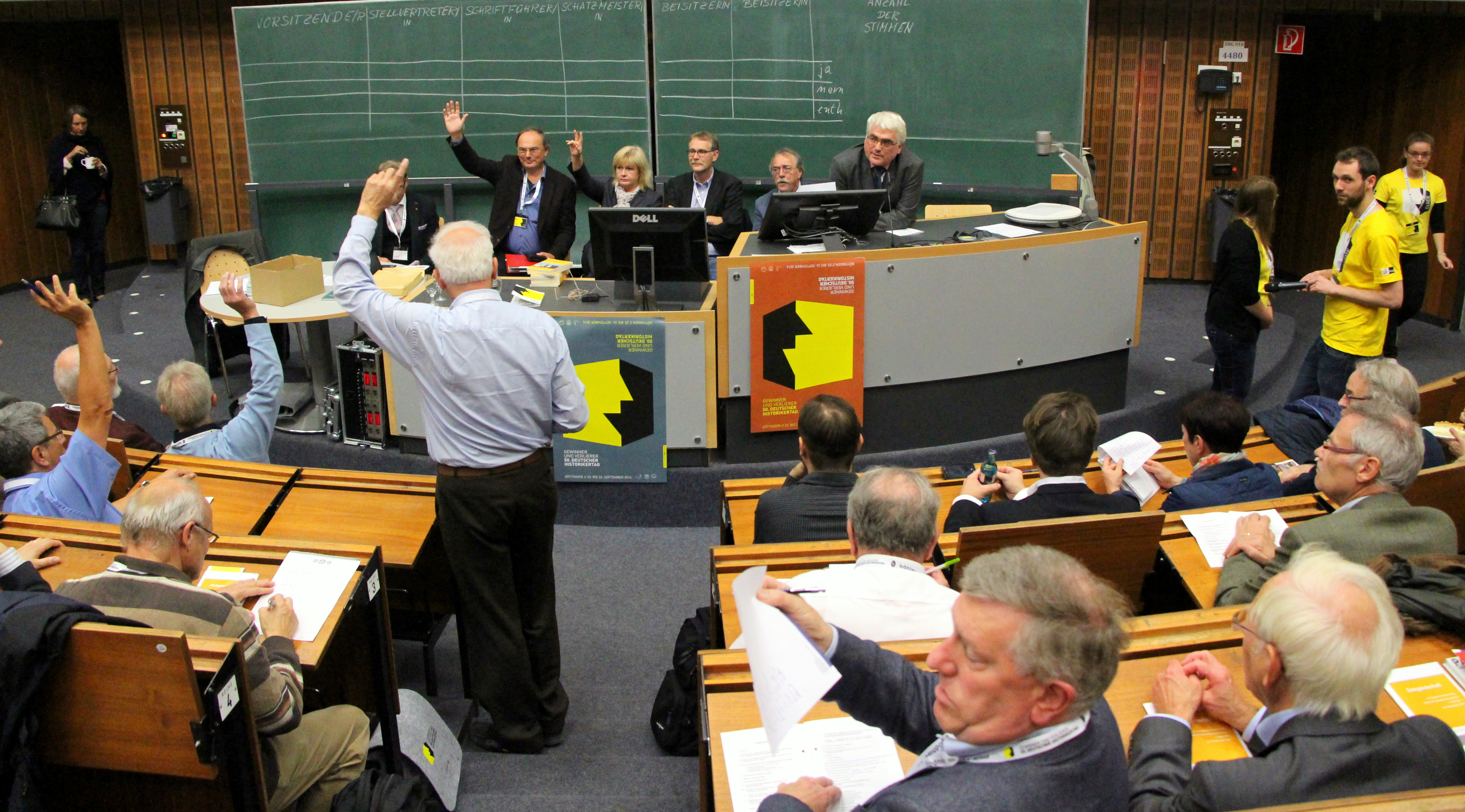 Historikertag 2014 in Göttingen. Verband der Geschichtslehrer Deutschlands, Mitgliederversammlung.